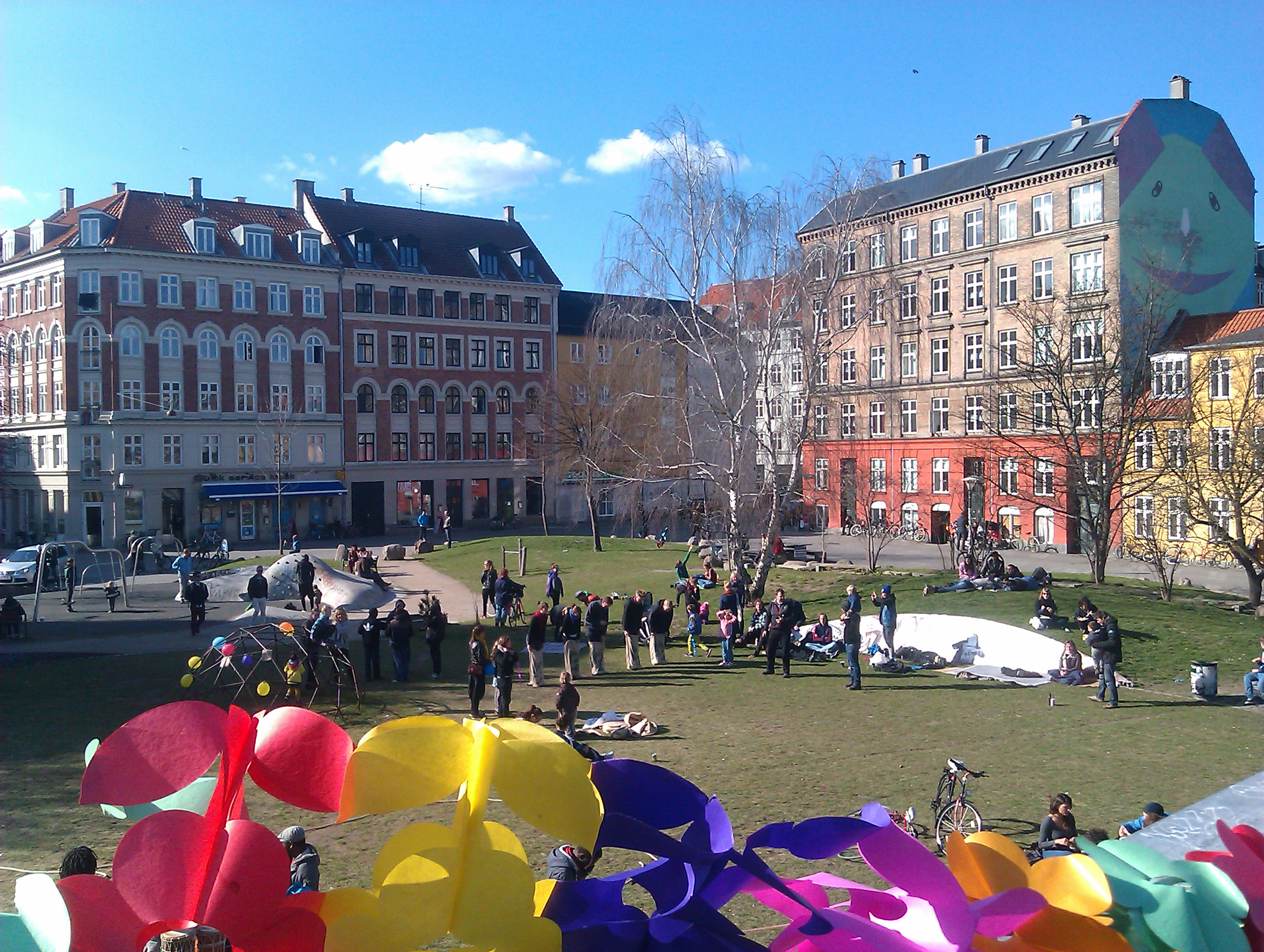 Folkets Park, Nørrebro, København